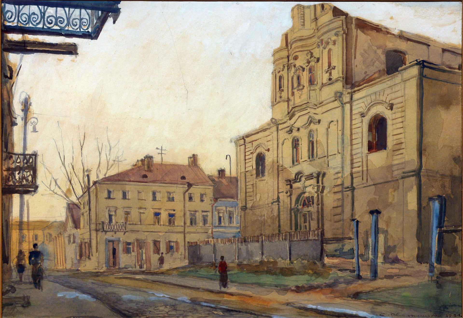 Беларуская (тарашкевіца): Менск (Miensk), вуліца Дамініканская (vulica Daminikanskaja) у бок скрыжаваньня з Валоцкай (vulica Vałockaja). Касьцёл Сьвятога Тамаша Аквінскага